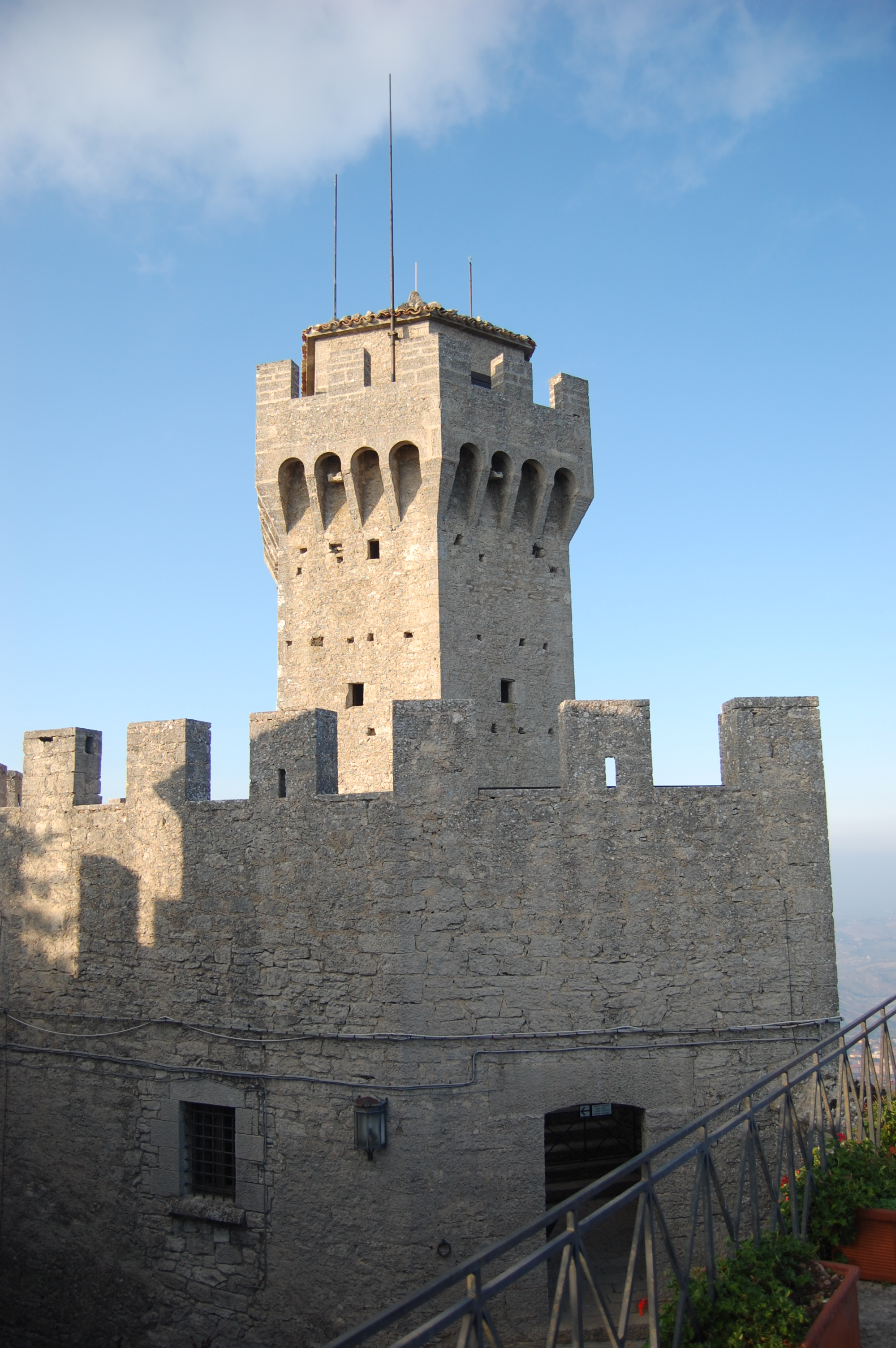 Torrione della Torre Cesta